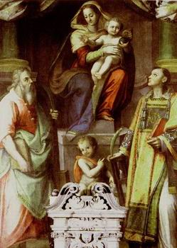 Madonna col Bambino fra i santi Andrea, Giovannino e Lorenzotitle QS:P1476,it:"Madonna col Bambino fra i santi Andrea, Giovannino e Lorenzo" label QS:Lit,"Madonna col Bambino fra i santi Andrea, Giovannino e Lorenzo"